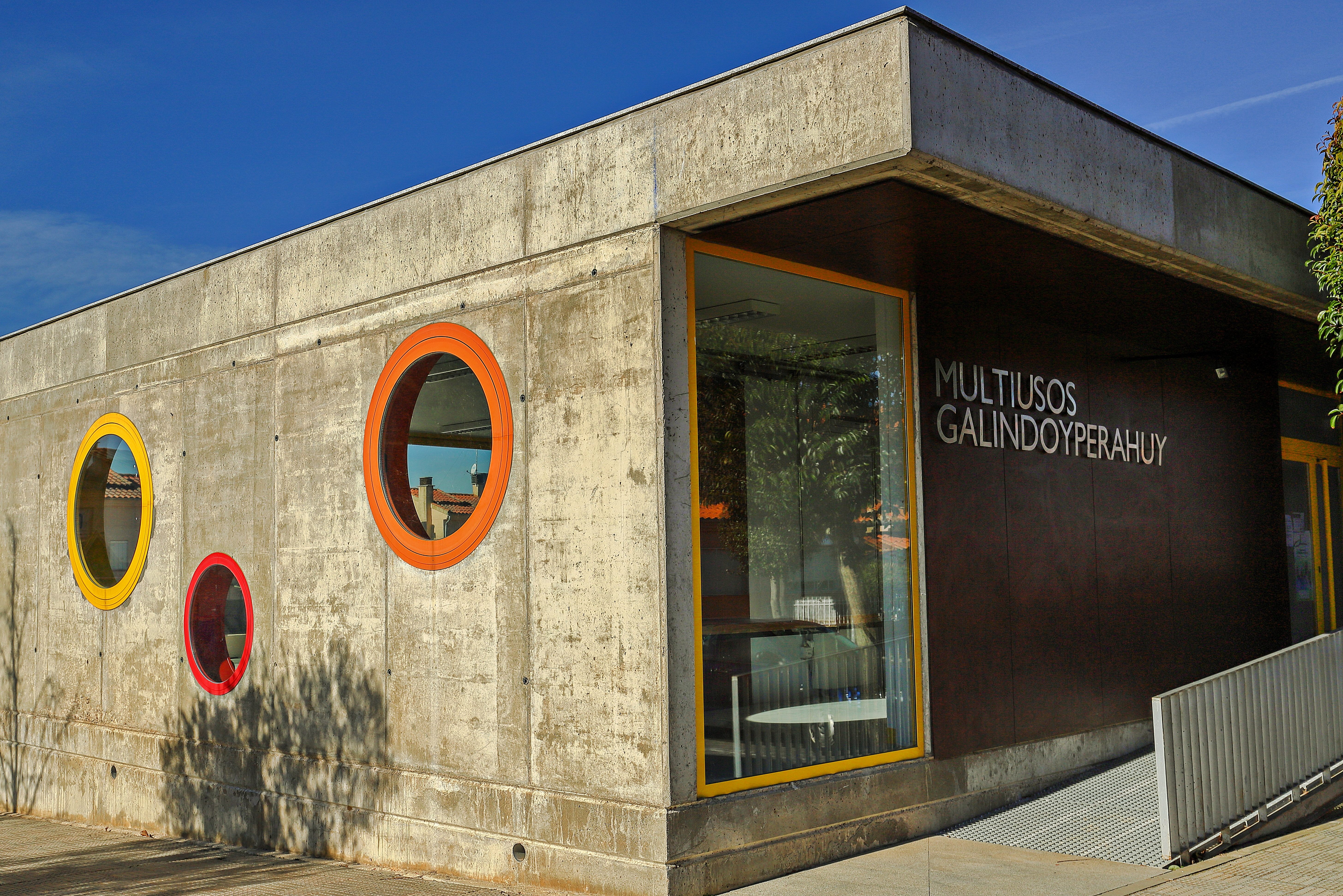 Galindo y Perahuy municipio de la comarca Campo de Salamanca, provincia de Salamanca.